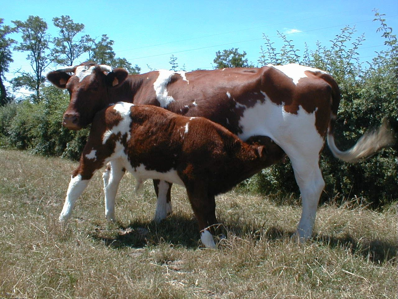 Vache de race Rouge des prés (ex Maine-Anjou) allaitant son veau Photo prise à Divertiparc : Parc de loisirs nature. publication et diffusion autorisée par Divertiparc selon les termes de la licence GNU Free Documentation. --Cyrille BERNIZET 19 avr 2005 à 22:11 (CEST)